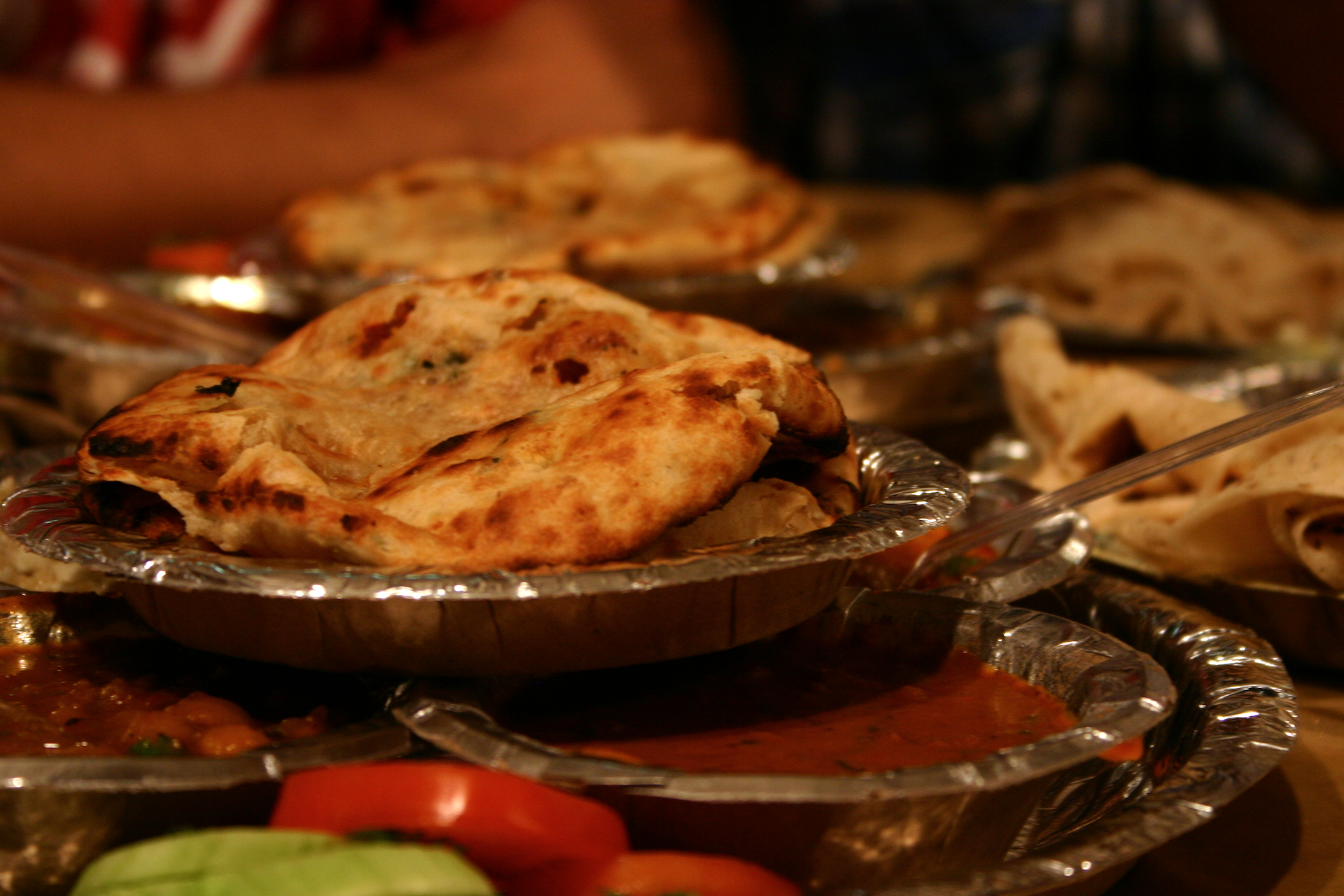 Ramlila in Delhi-6.